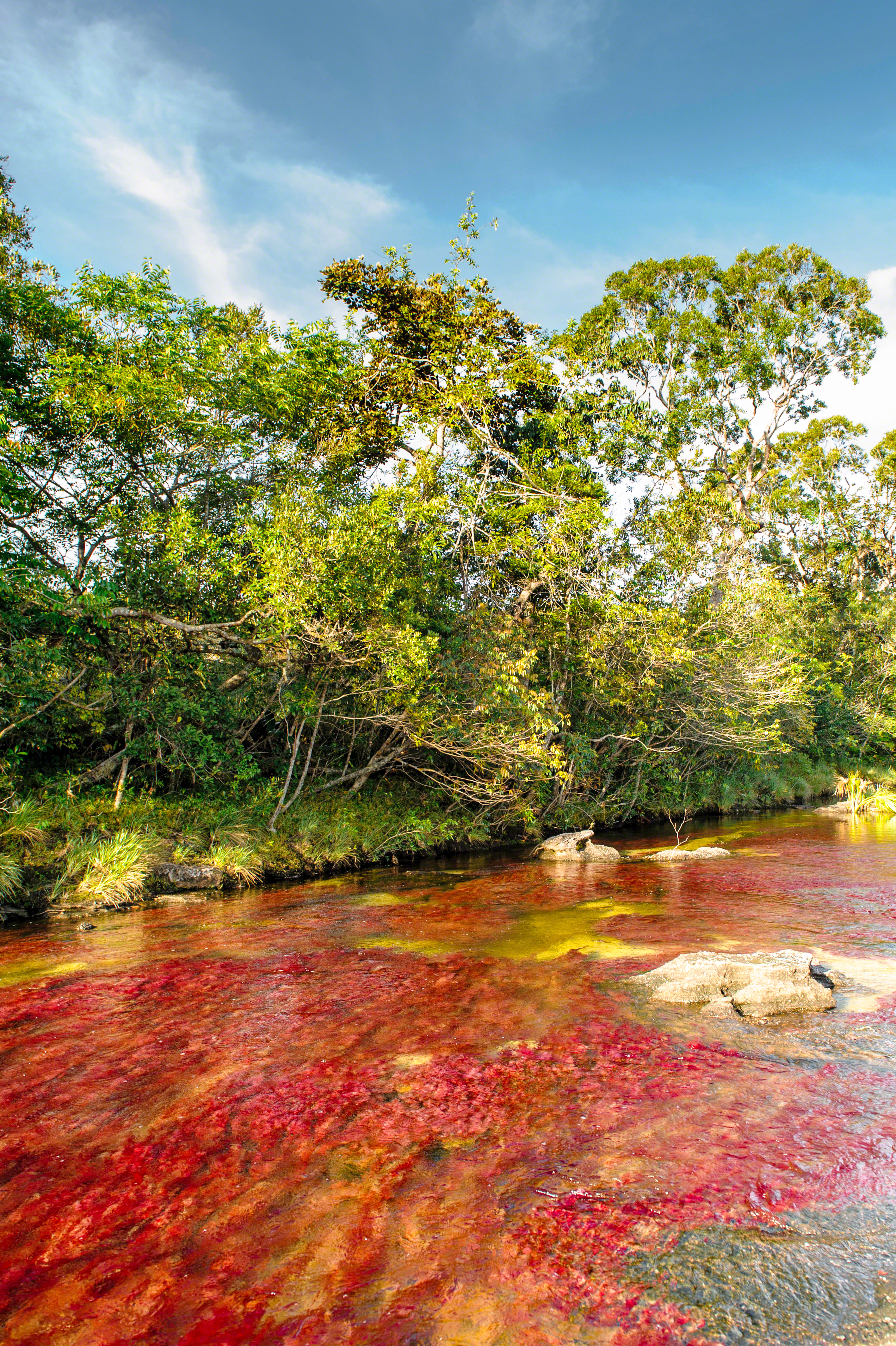 El Tapete es uno de los puntos más lindos del recorrido por Caño Cristales, donde es posible apreciar la planta macarenia clavigera extendida por el lecho del río. Fotografía por Mario Carvajal, Licenciada con Creative Commons Reconocimiento 3.0 Unported. Usted puede usar esta imagen en cualquier proyecto, inclusive con fines comerciales, siempre y cuando otorgue el crédito de autoría y el vínculo hacia el proyecto de Caño Cristales, correctamente. (